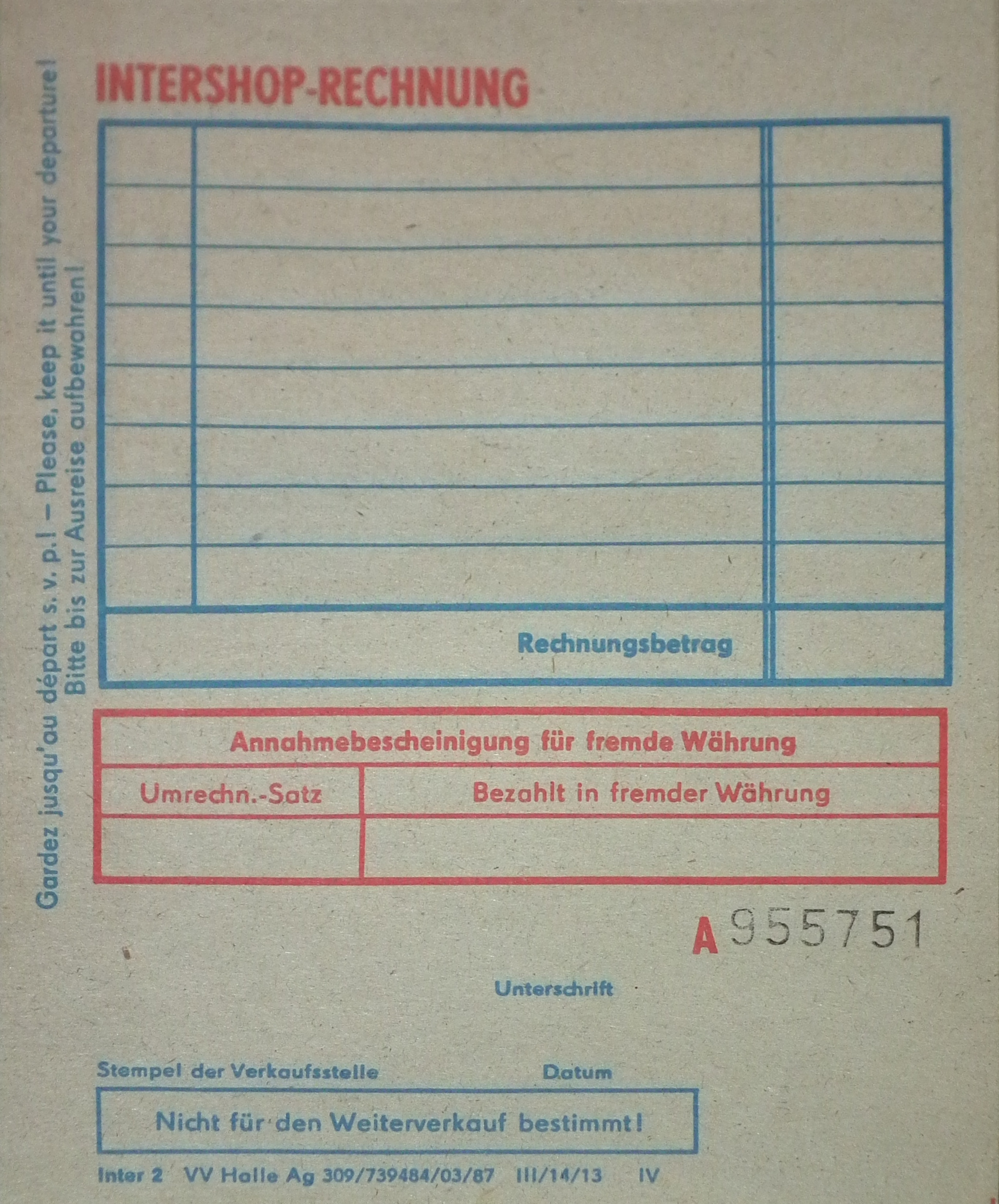 Intershop-Rechnung, Veröffentlicht mit Genehmigung der Museumsleitung